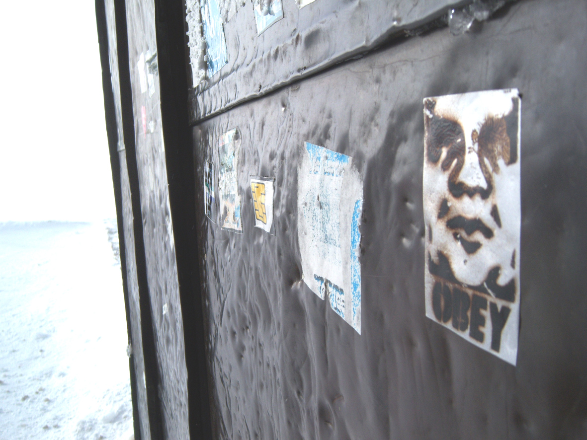 OBEY war hier